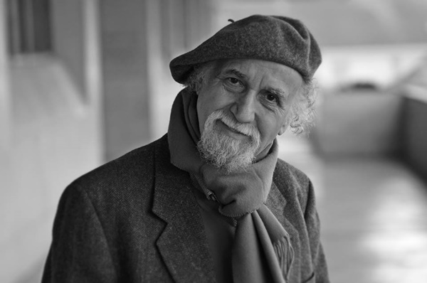 Sándor György, Streit (Budapest, 1938. április 4. –) a Nemzet Művésze címmel kitüntetett, Kossuth- és Jászai Mari-díjas író, előadóművész, „humoralista”.